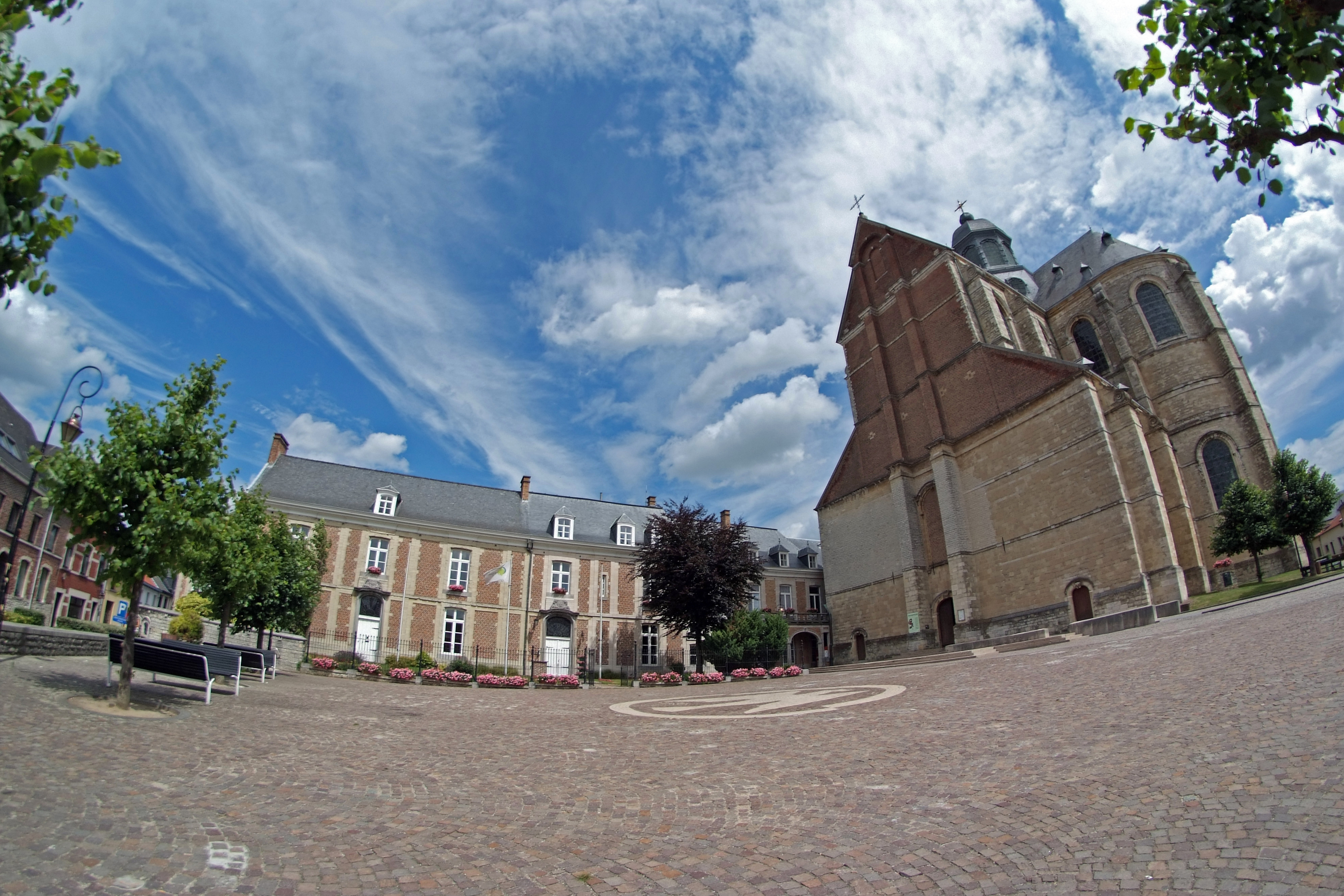 Abdij van Grimbergen, en Sint-Servaas basiliek, Vlaams Brabant, Grimbergen